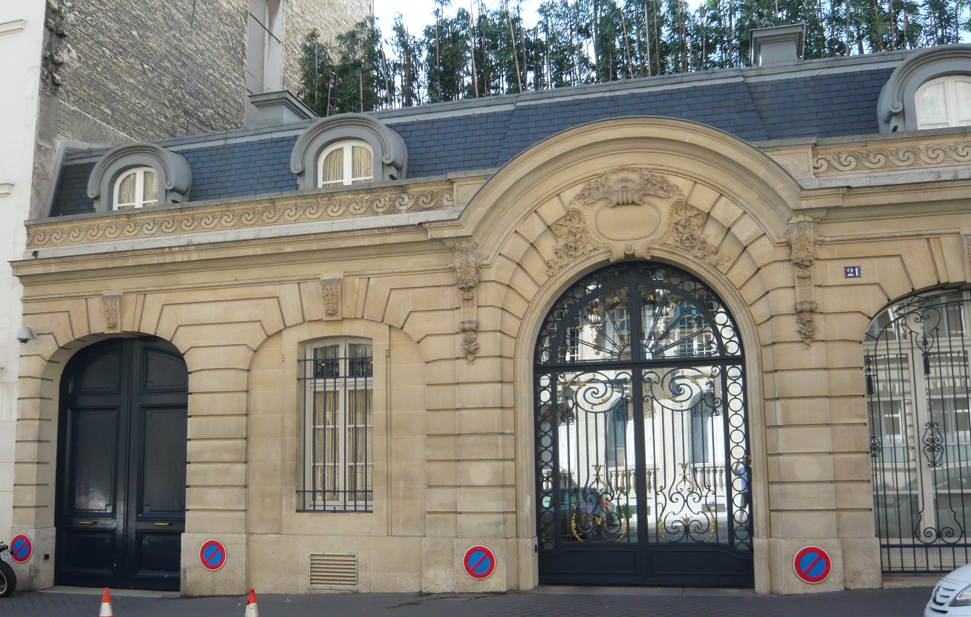 Hôtel Le Vavasseur Object location48° 51′ 57.78″ N, 2° 17′ 29.63″ E